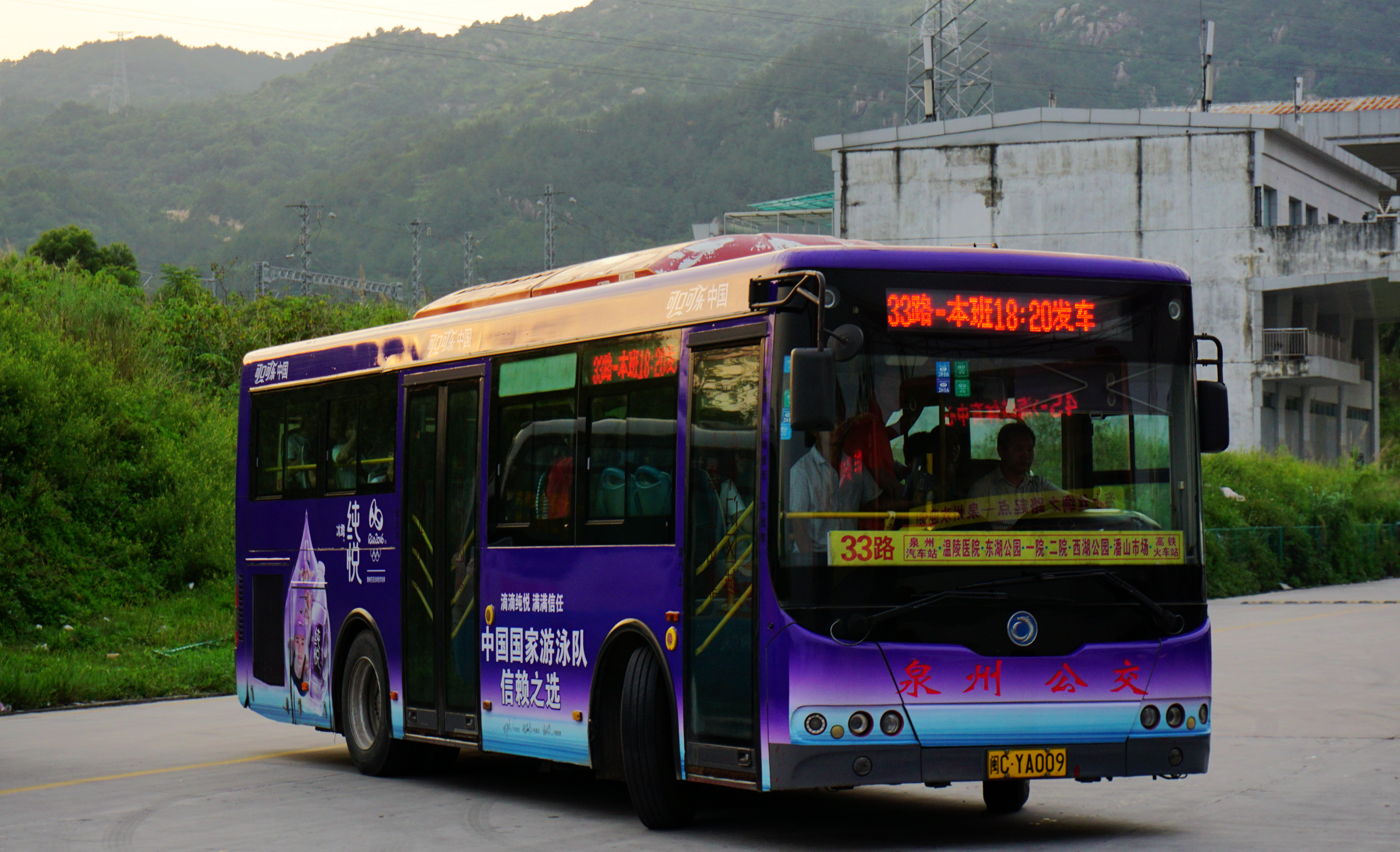 泉州公交33路，闽CYA009